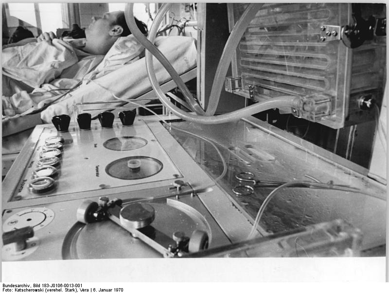 Berlin, Charité, Nierenzentrum, Dialyse Zentralbild Katscherowski 6.1.70-kat-Berlin: Nierenzentrum der Charité- Die Dialyse-Abteilung ist das Herzstück des Nierenzentrums in der Berliner II. Medizinischen Universitätsklinik (Direktor: Prof. Dr. Lutz). Hier werden Patienten mit chronischem Nierenversagen auf eine Nierentransplantation, die im neueröffneten Nierenzentrum des Krankenhauses Friedrichshain erfolgt, vorbereitet. Die Charité verfügt zur Zeit über vier Dialyseplätze, an denen gegenwärtig acht Patienten behandelt werden. Mit dem Dialysator (Künstliche Niere) Aue II (unser Foto), der von einem Spezialkollektiv der DDR entwickelt wurde, sind sämtliche 20 Nierenzentren der DDR ausgerüstet. Patienten mit chronischen Nierenleiden, d.h. mit sehr geringer oder keiner Funktionstüchtigkeit der Niere, werden zweimal in der Woche 10 bis 12 Stunden an die Künstliche Niere angeschlossen. Diese Behandlung ermöglicht ein Leben ohne Funktion der eigenen Niere, zugleich eine weitgehende Rehabilitation bis zur Arbeitsfähigkeit. Bitte beachten Sie dazu auch unsere Fotos Nr. J 0106-12 und 14-1N